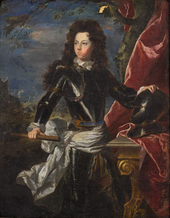 Portrait de Louis de Rouvroy de Saint-Simon (1675-1755), vidame de Chartres